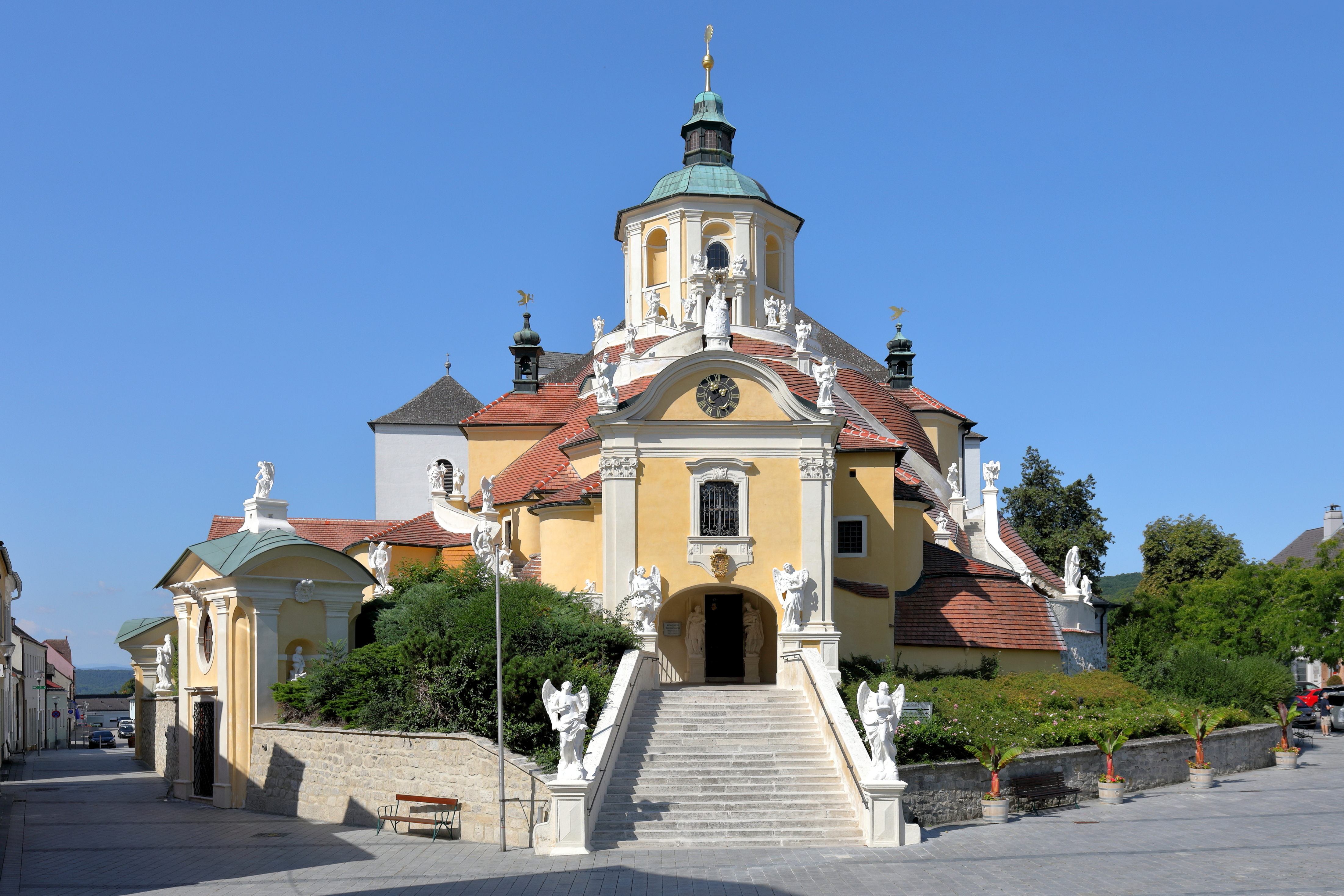 Ostansicht des Kalvarienberges in der burgenländischen Landeshauptstadt Eisenstadt.Der Kalvarienberg mit der Gnadenkapelle „Maria Einsiedeln“ im Zentrum wurde zu Beginn des 18. Jahrhunderts im Auftrag des Fürst Paul I. Esterházy errichtet, 1707 geweiht und später mehrfach verändert. Er ist ein überbauter, künstlich aus Steinen errichteter Berg, in dem Treppen und dunkle Gänge an Nischen, Grotten und kleinen Kapellen vorbeiführen. Darin wird anhand von Figurengruppen die Leidensgeschichte Christi dargestellt. Westseitig an den Kalvarienberg ist die später errichtete Berg- bzw. Haydnkirche angebaut.